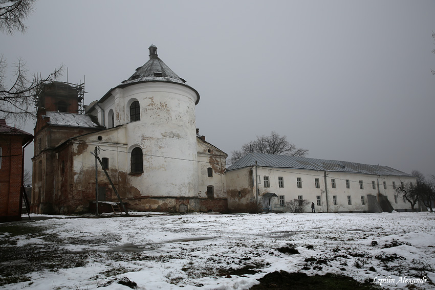 Мсціслаў. Касцёл Узнясення Дзевы Марыі